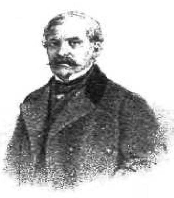 Griechischer Industrieller und Stifter, 19. Jahrhundert